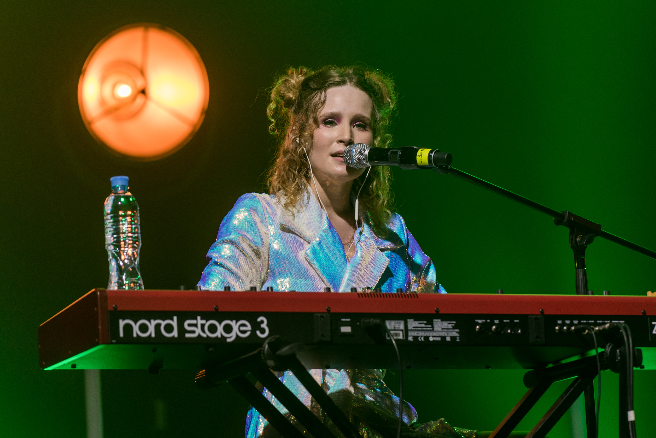 Монеточка (концерт Монеточки в А2)